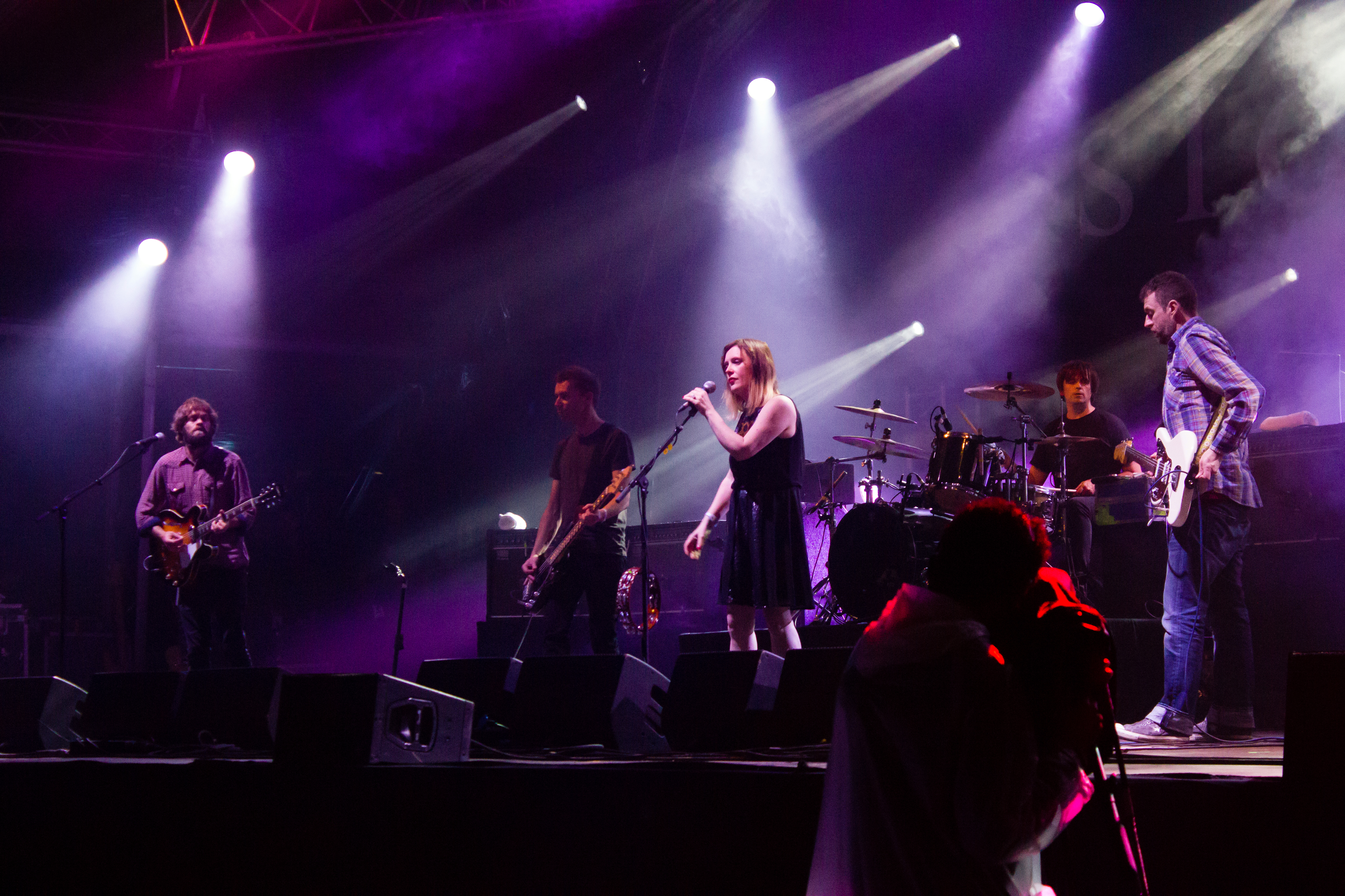 A banda británica Slowdive no NOS Primavera Sound 2014 de Porto.